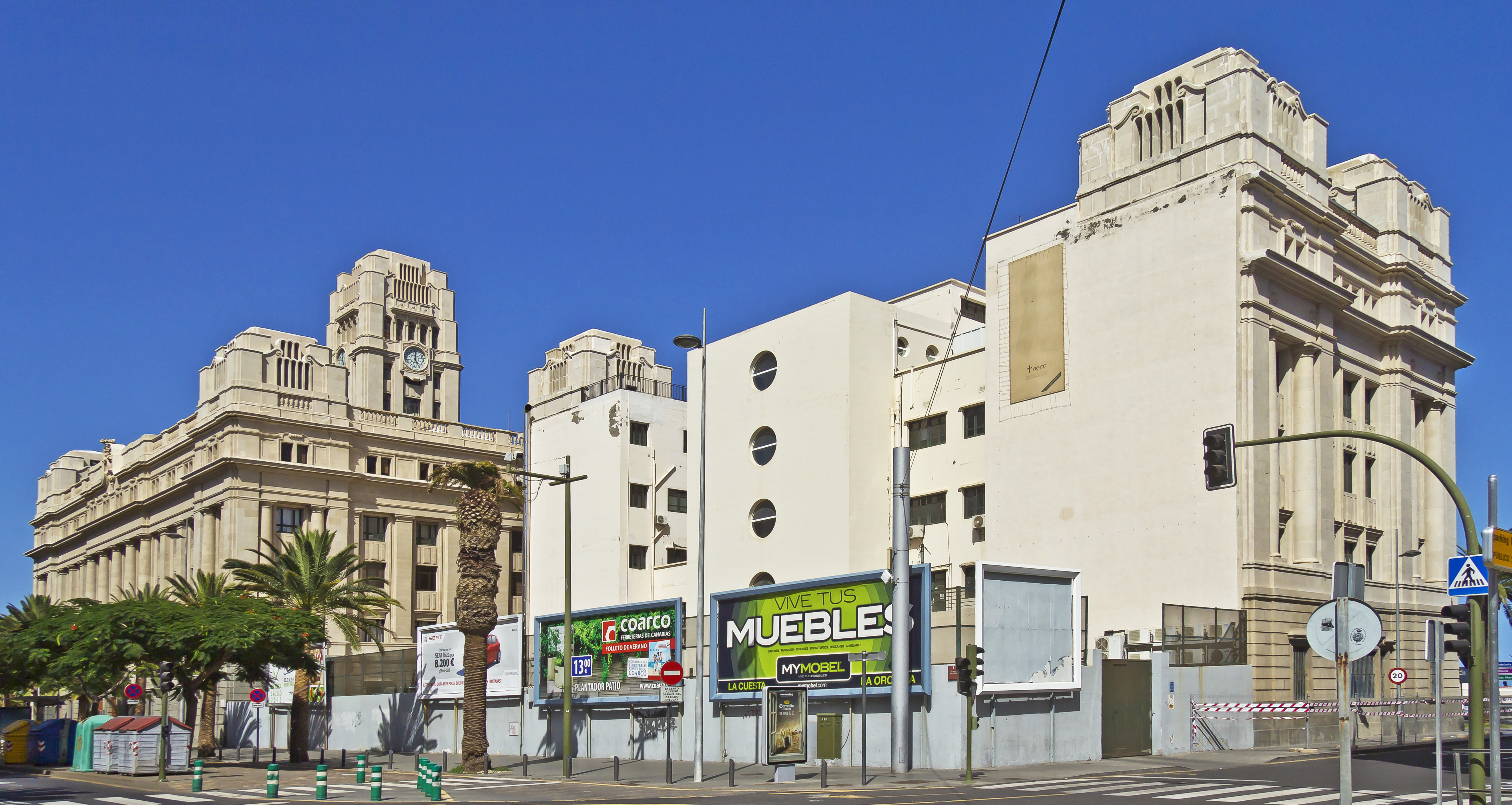 Westfassade des Gebäudes des Cabildo Insular de Tenerife in Santa Cruz de Tenerife